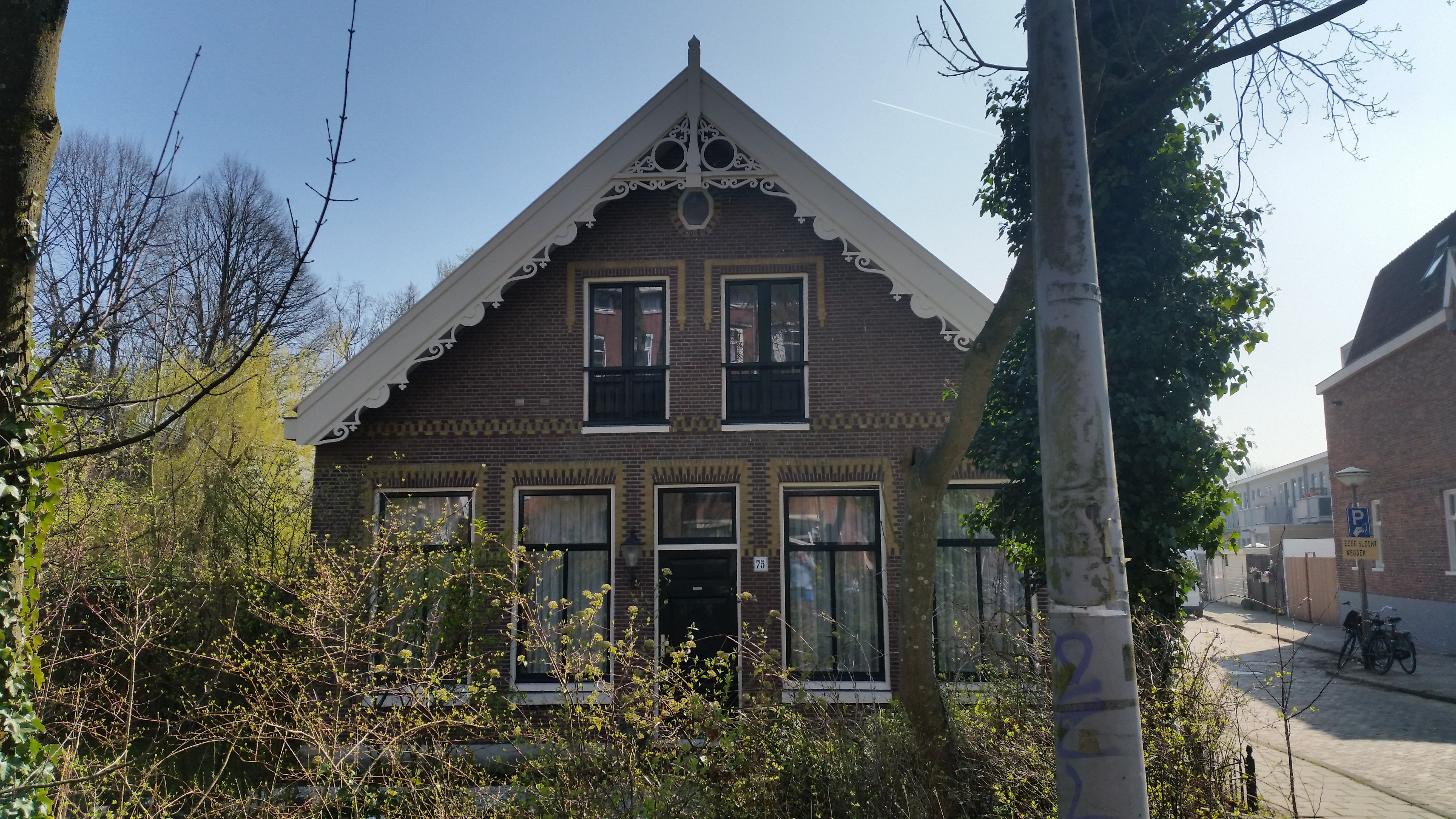 Rijnsburgstraat 75, Amsterdam; gemeentelijk monument